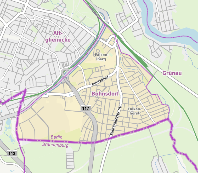 Übersichtskarte der Straßen und Ortslagen in Berlin-Bohnsdorf